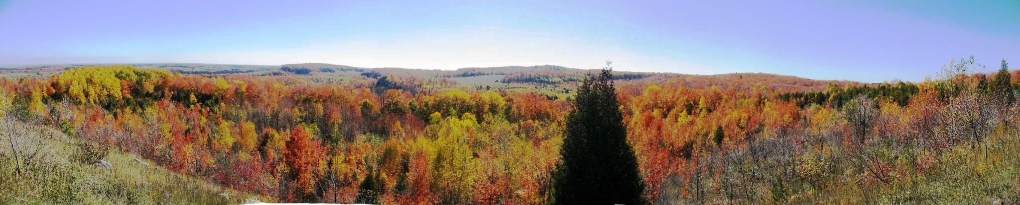 Panorama im Mono Cliff Provincial Park